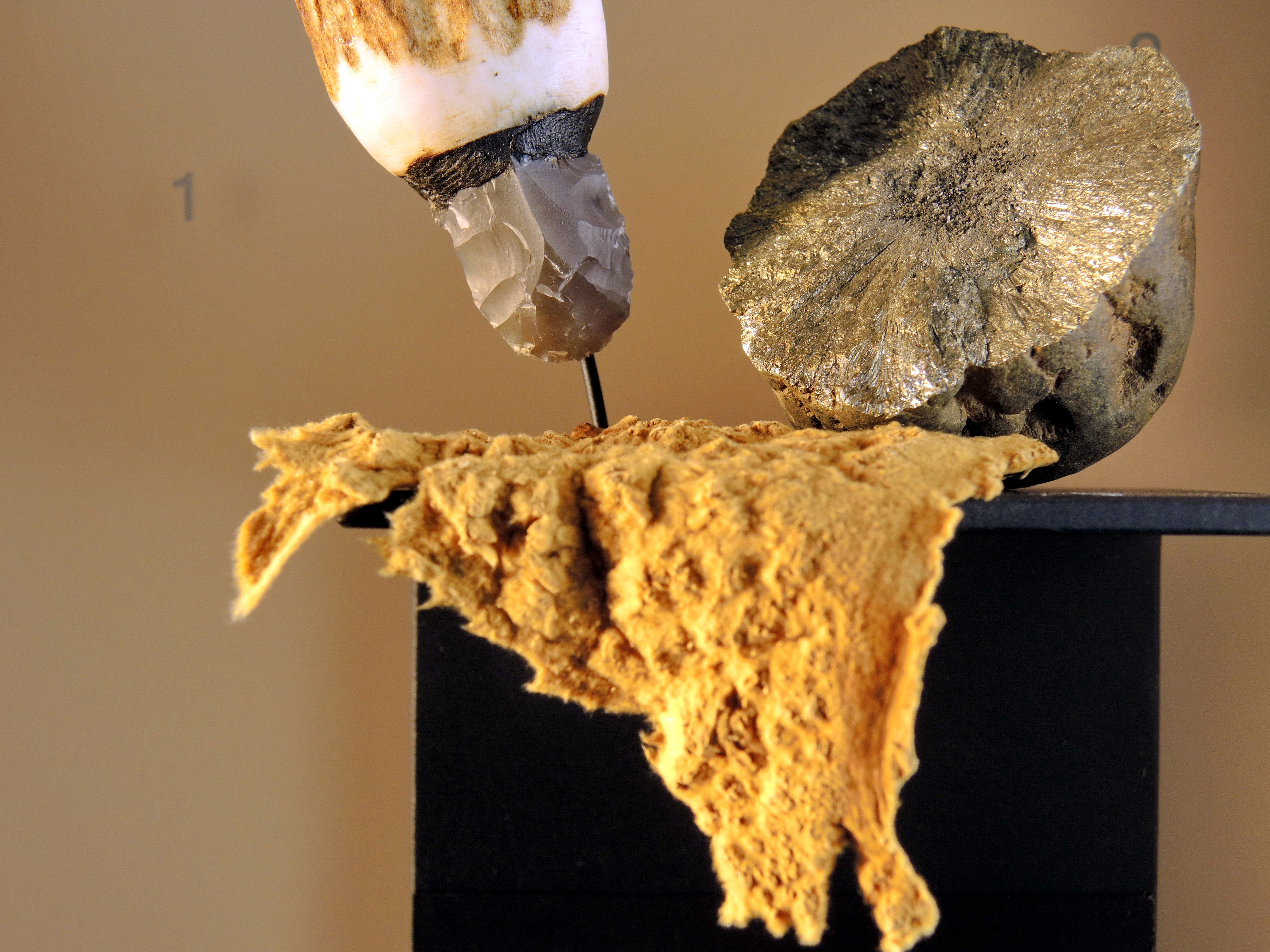 Ausstellung Archäologie im Parkhaus Opèra, Exponat aus der Grabung Parkhaus Opéra in Zürich (Switzerland) : Horgener Kultur, Feugerschlegel mit Schwefelkies und Zunder.